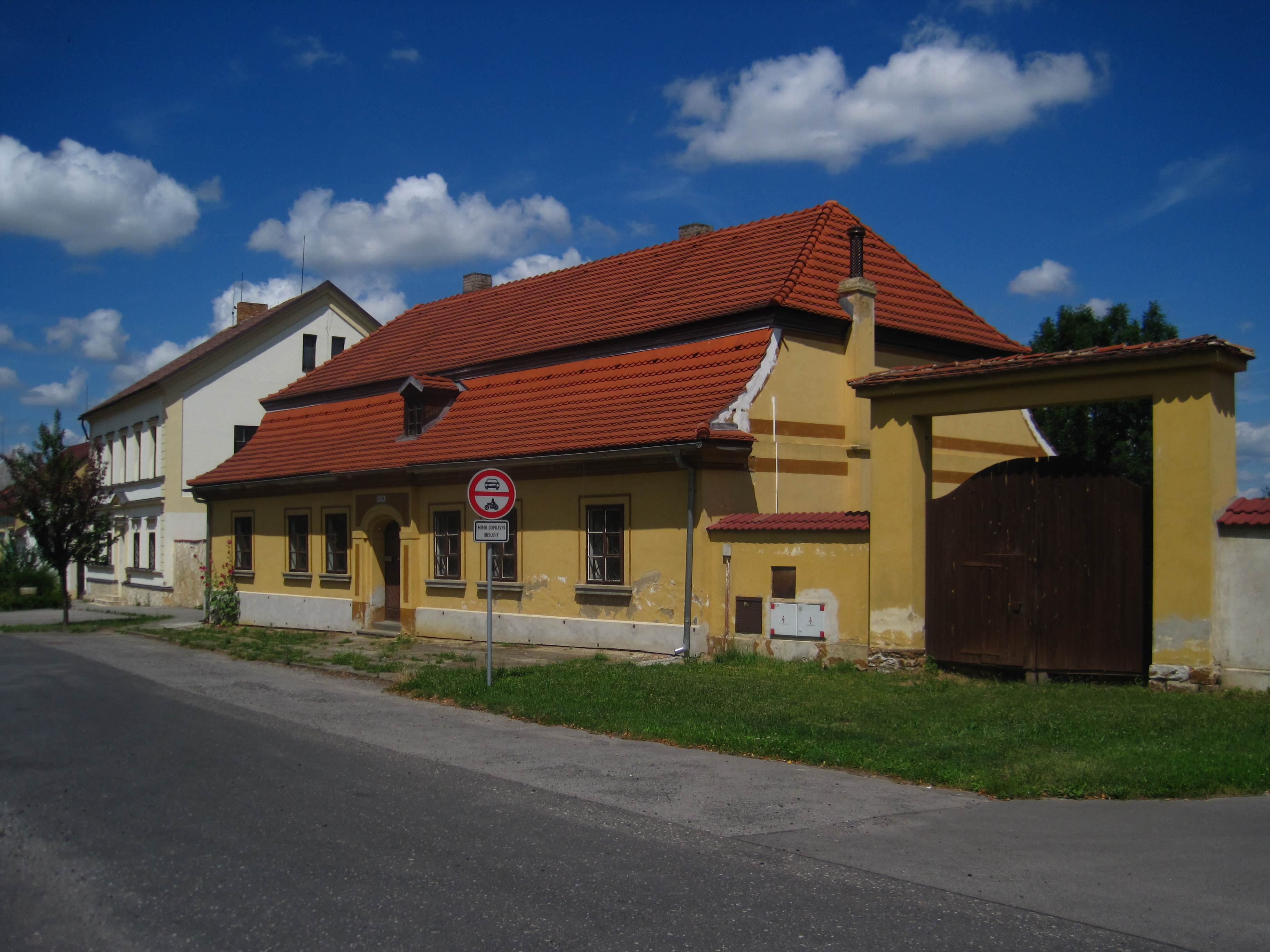 Zemědělský dvůr čp. 64, Tyršovo náměstí 64, Hostomice (okres Beroun).